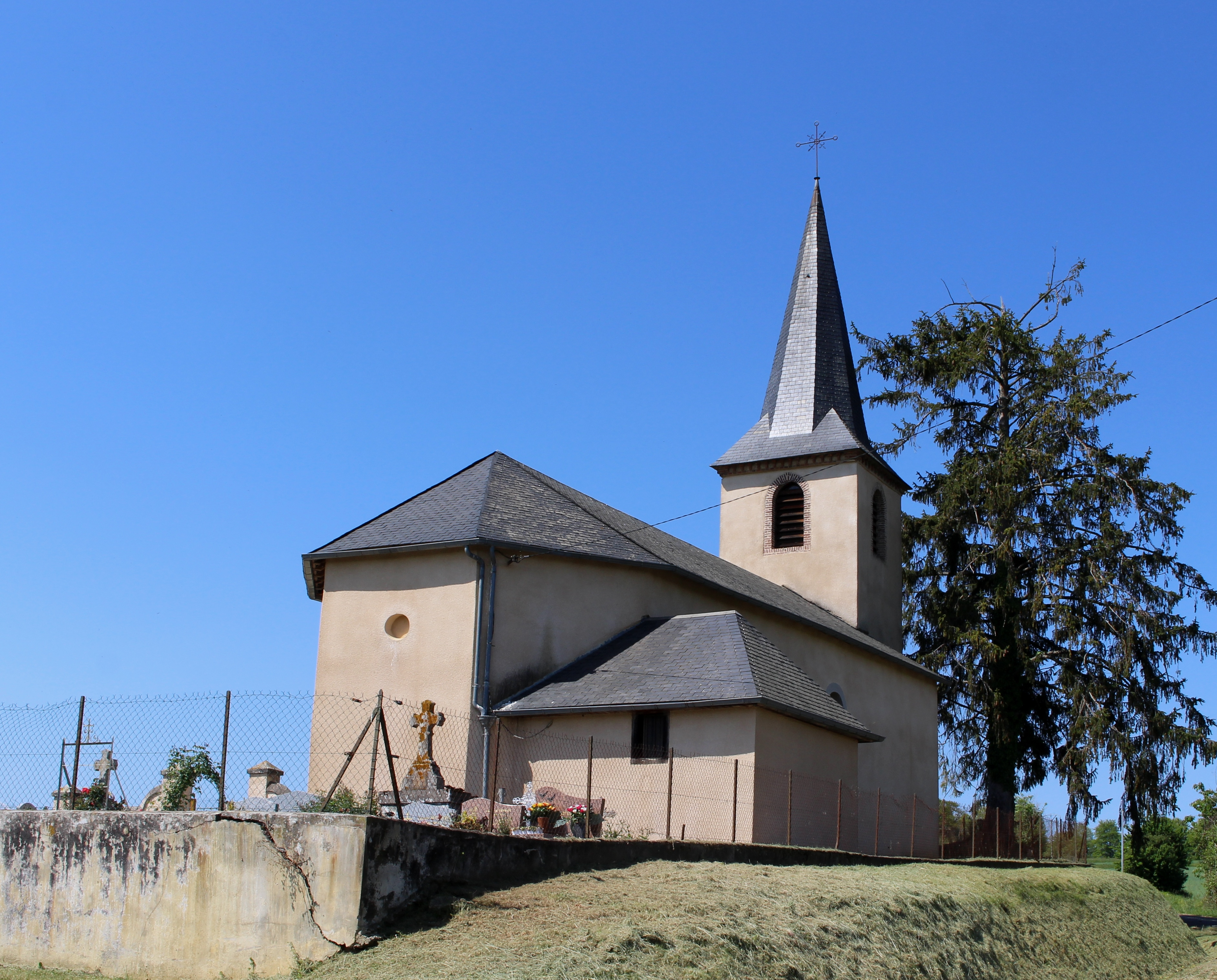 Église Saint-André de Lansac (Hautes-Pyrénées)